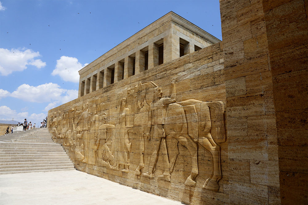 آنیت‌کابیر